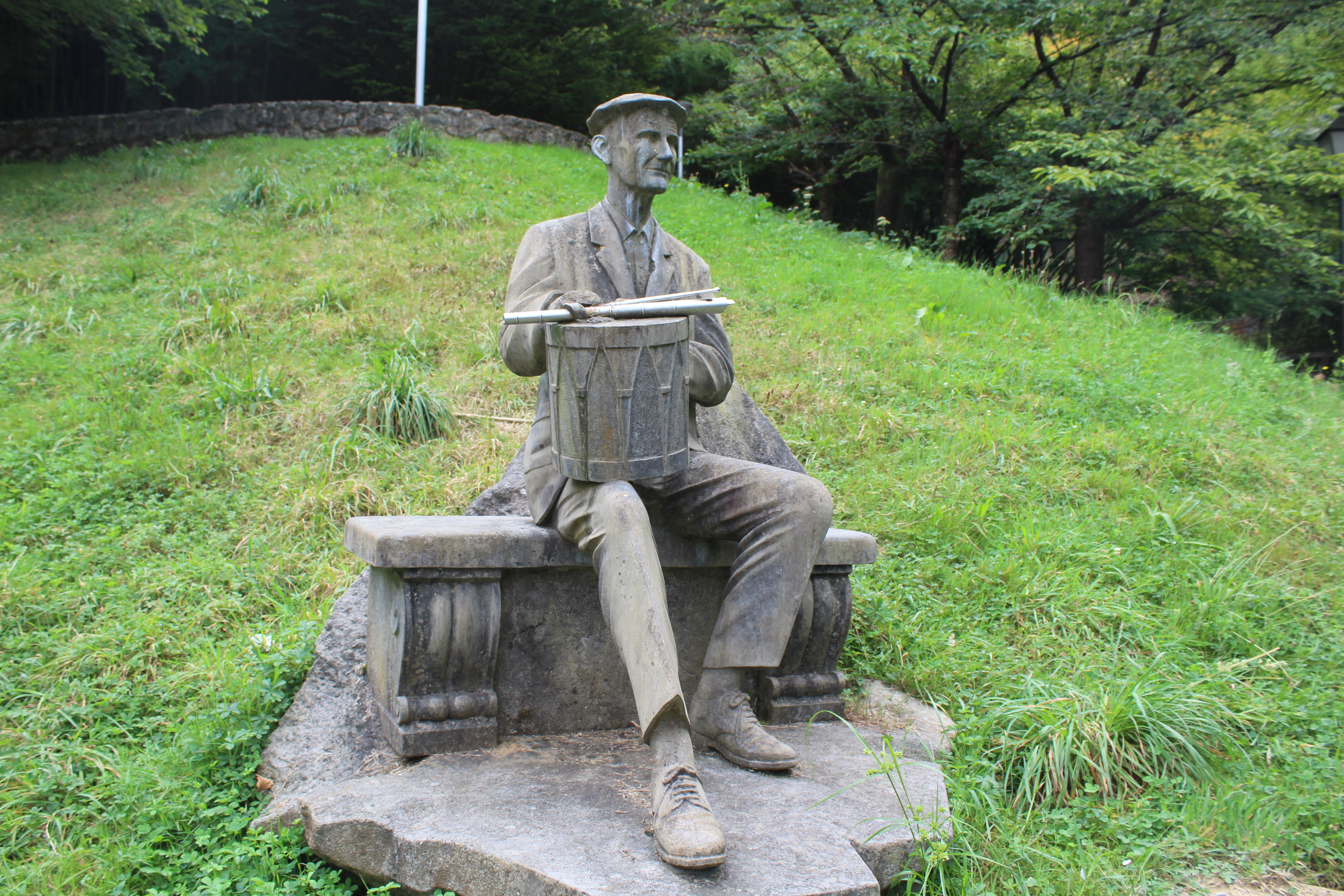 Txomin San Sebastian Muruaren omenez Astigarragan dagoen eskultura Irudi hau Wikibizi kanpainaren baitan igo da, Euskal Wikilarien Kultura Elkarteak 2020an deitutako argazki lehiaketa hirukoitza. Helburua, Euskal Herria hobeto ezagutzen laguntzea da.Lagundu zuk ere irudi hau dagokion artikuluetan txertatzen.